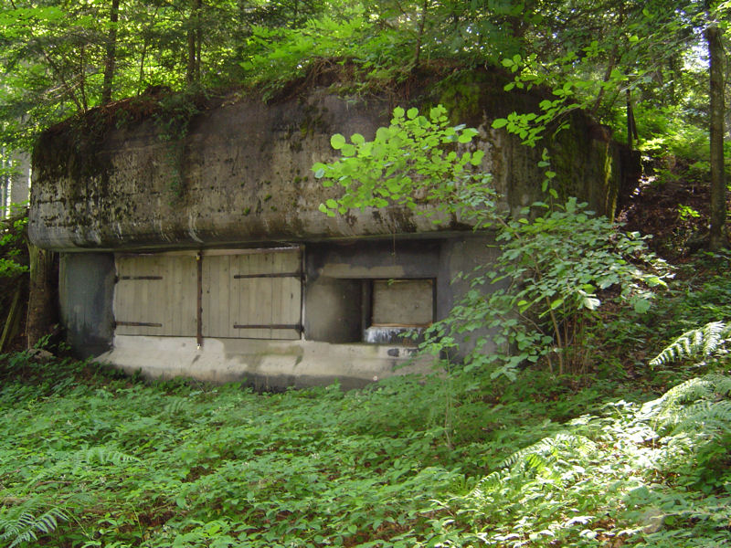 Panzerabwehrkanonen Bunker, Sibristboden, Kt. Zug